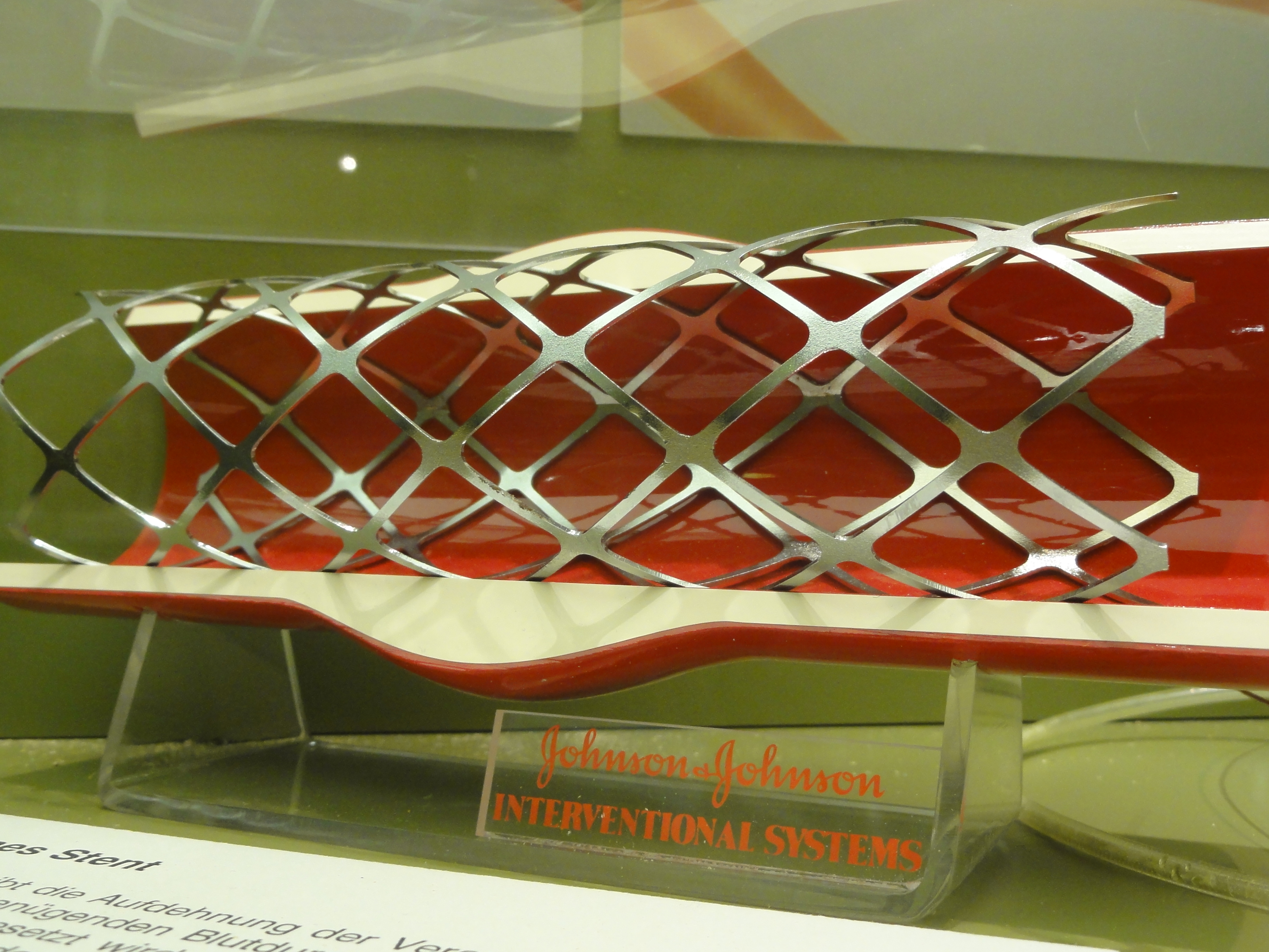 Basel — Anatomisches Museum der Universität